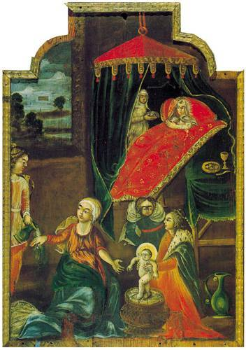 Абраз Нараджэння Мацi Божай. З вёскi Ляхавiчы Драгiчынскага р-на. Нацыянальны мастацкi музей Рэспублiкi Беларусь